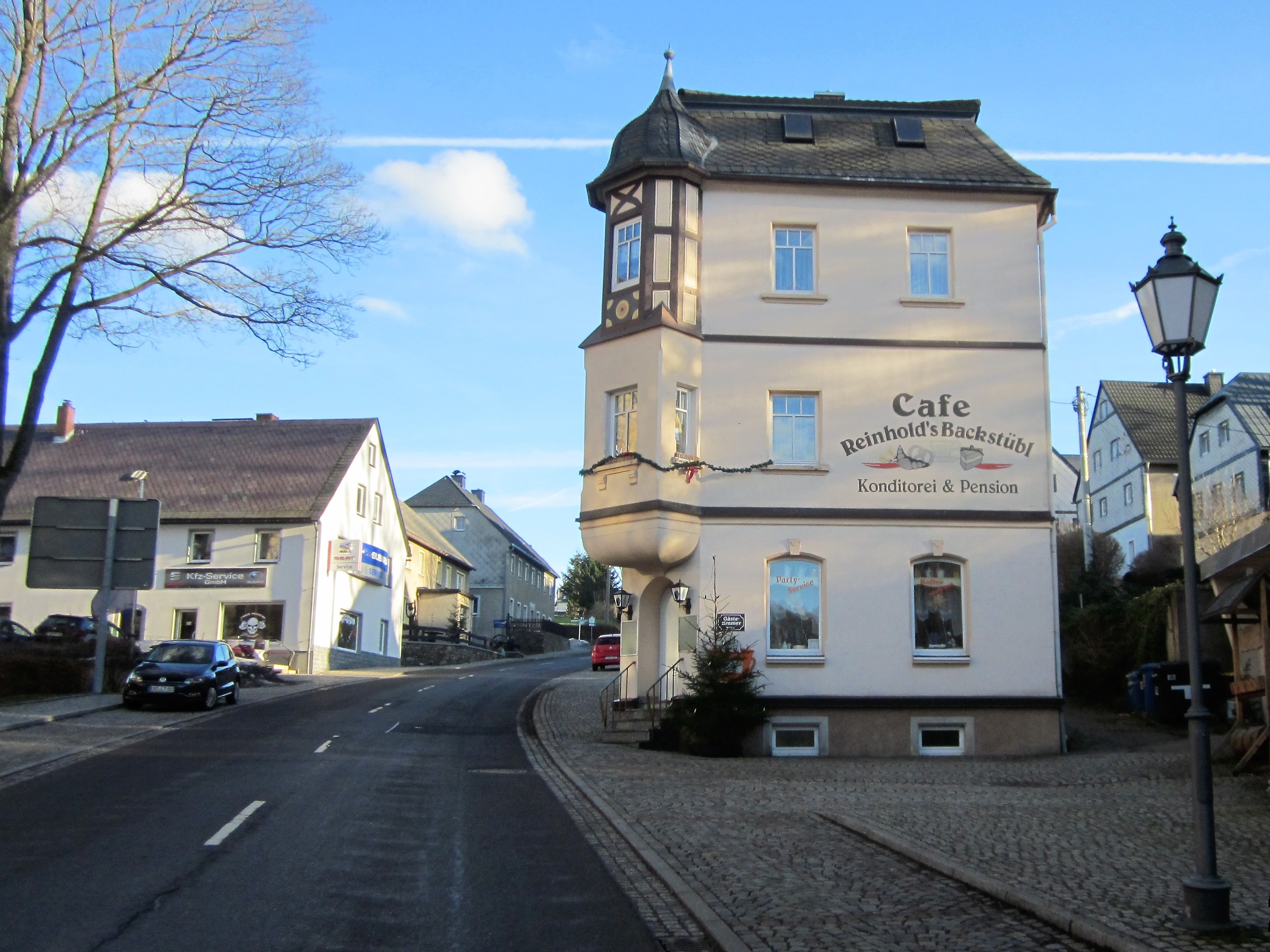 Bäckerei Thümmel Neuhausen (Ergeb.), Brüxer Straße 4. Nach Familie Thümmel wurde die Bäckerei durch Walter Wellmann fortgeführt, danach übernahm dies Wolfgang Lehmann. Heute wird die Bäckerei durch Familie Reinhold geführt.